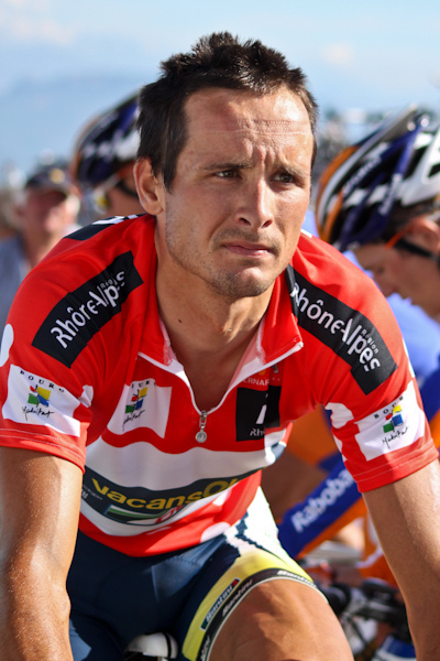 4e étape (Col du Grand Colombier) du Tour de l'Ain 2011